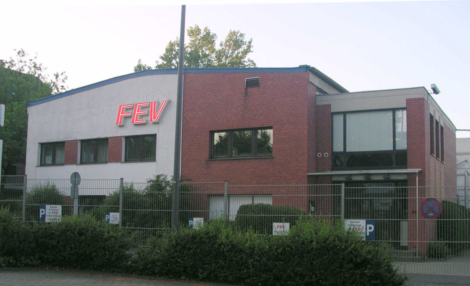 Aachen, FEV-Gebäude an der Jülicher Straße (früheres Fafnir-Werk)